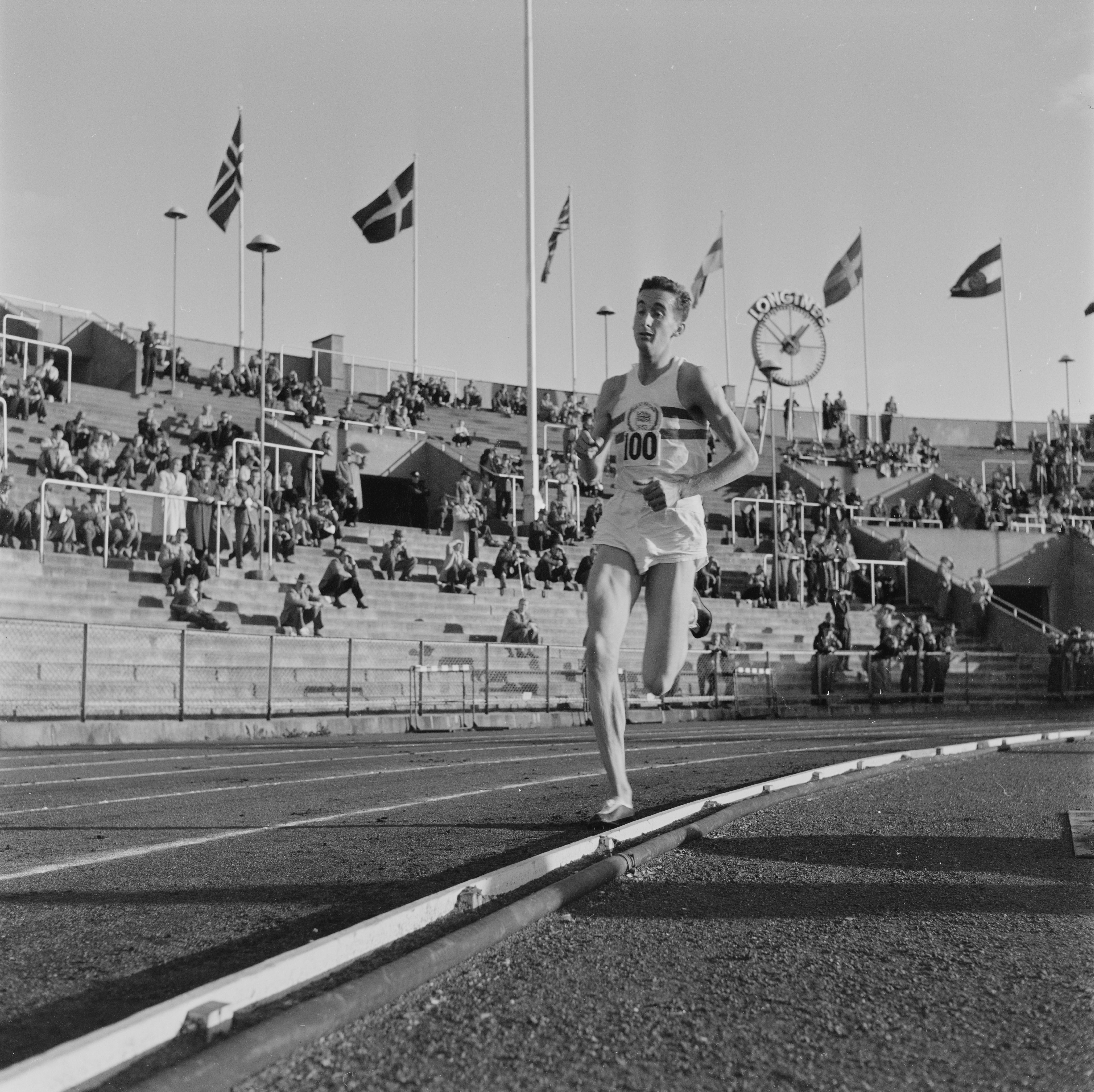 Bildet er hentet fra Arkivverket. Friidrett, Bislet (Oslo-lekene). NÅ nr. 20, 1953. A: Sverre Strandli, slegge; Imre Nemeth, slegge; Joseph Czermak, slegge; Egil Danielsen, spyd; Gordon Pirie, langdistanse; Audun Boysen, mellomdistanse (med Nielsen); Gunnar Nielsen, dansk mellomdistanseløper.B: Tabori; Ikaros; Boysen; Strandli; Danielsen Arkivinstitusjon : Riksarkivet Arkivnavn : Billedbladet NÅ Sted : Norge, Oslo, Oslo, Bislet Emneord: Friidrett, Sport, Idrett Avbildet